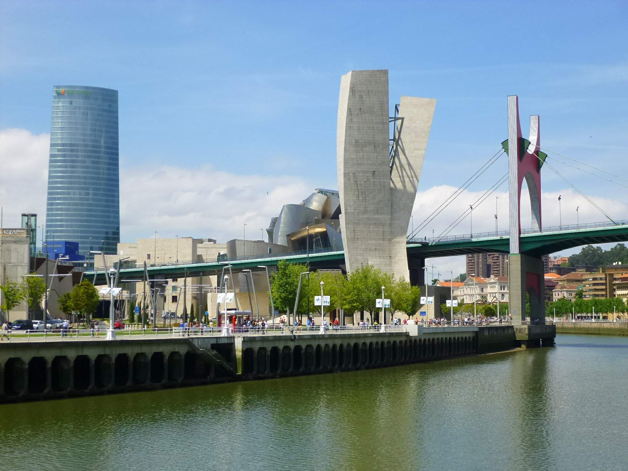 Torre Iberdrola y Puente de La Salve (Bilbao)